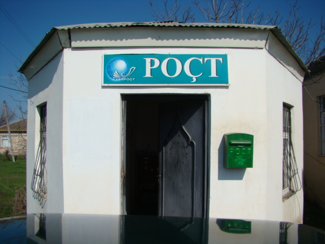 Yeni Daşkənd kəndində Poçt